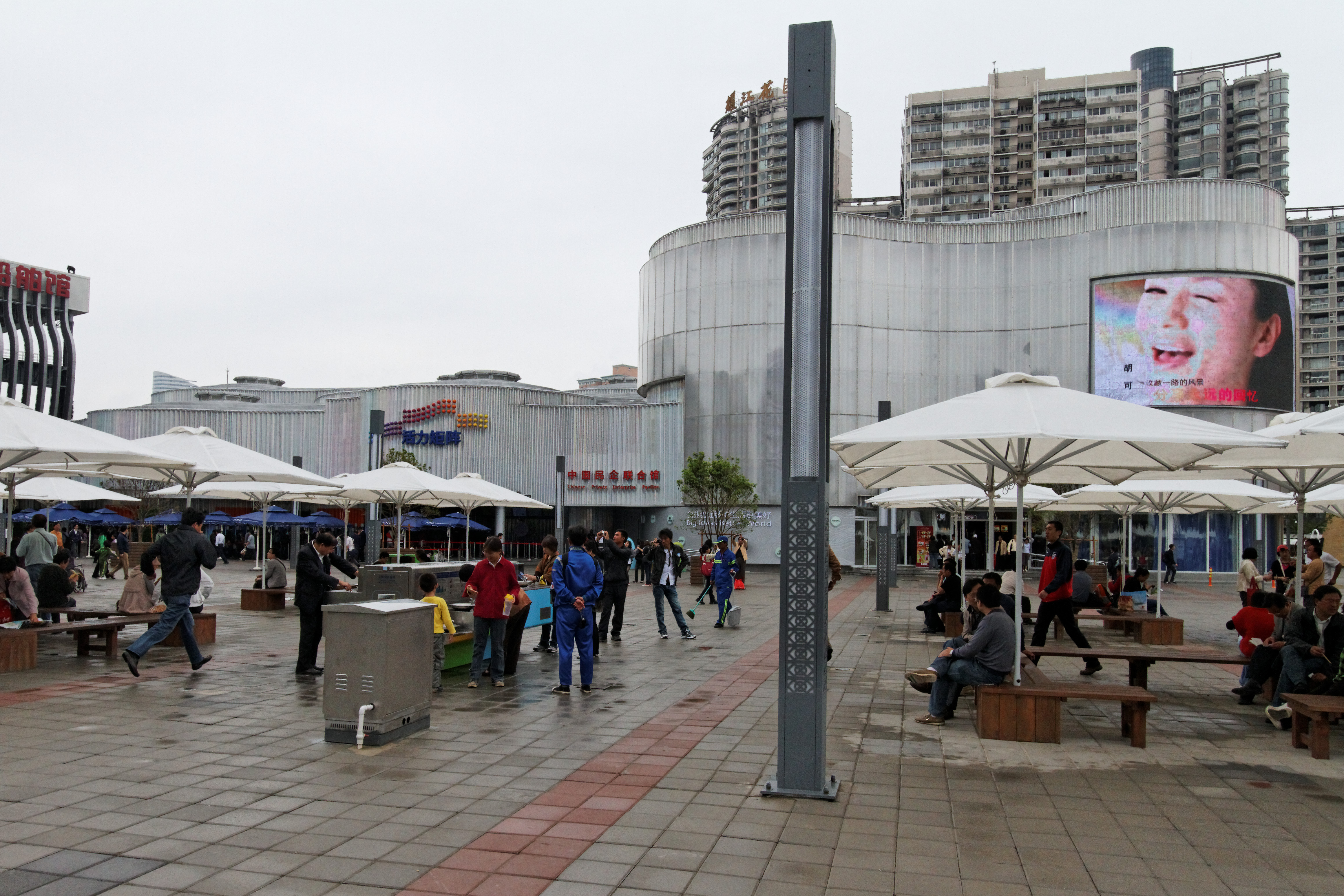 Chinese Private Enterprise Pavilion, Expo 2010